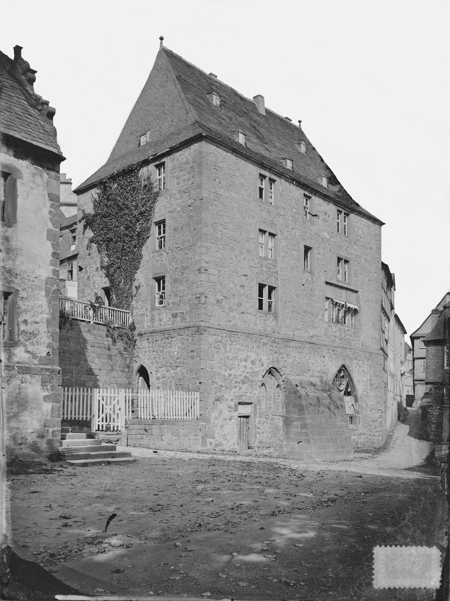 Karner, Ritterstraße 7 in Marburg, Ansicht von SW (Kirchhof). Der untere Teil wurde früher als Karner (Beinhaus) für den angrenzenden Friedhof genutzt. Im 14. und 15. Jahrhundert diente das Oberschoß als Ratsstube der Stadt. This is a photograph of an architectural monument.